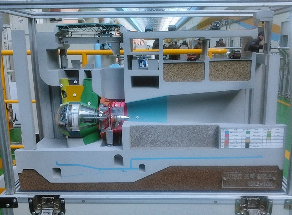 시화호조력발전소 수차발전기 축소모형